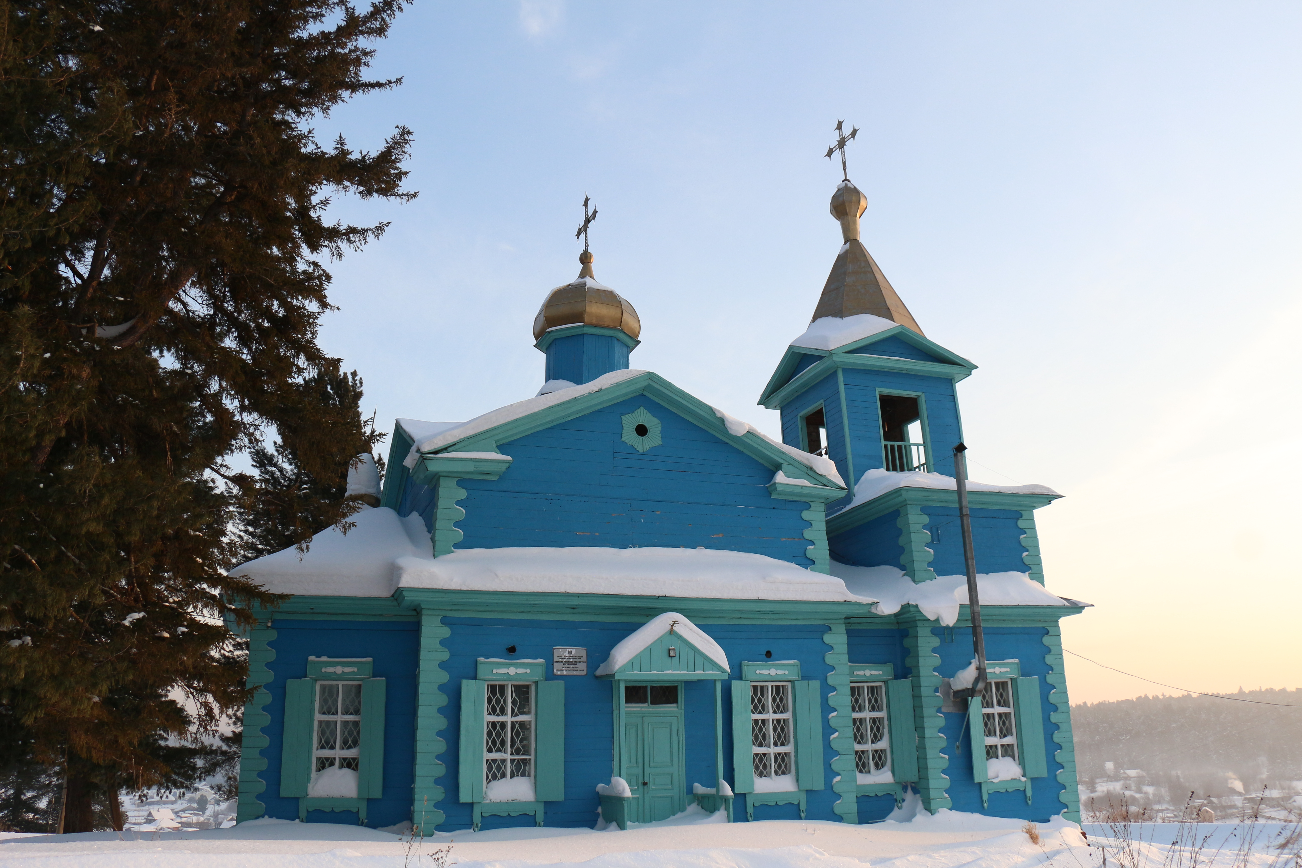 Покровская церковь: улица Весенняя, 1, Петухово, Томский район, Томская область